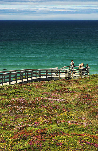 Playa de las Catedrales, Galicia - agosto 2006